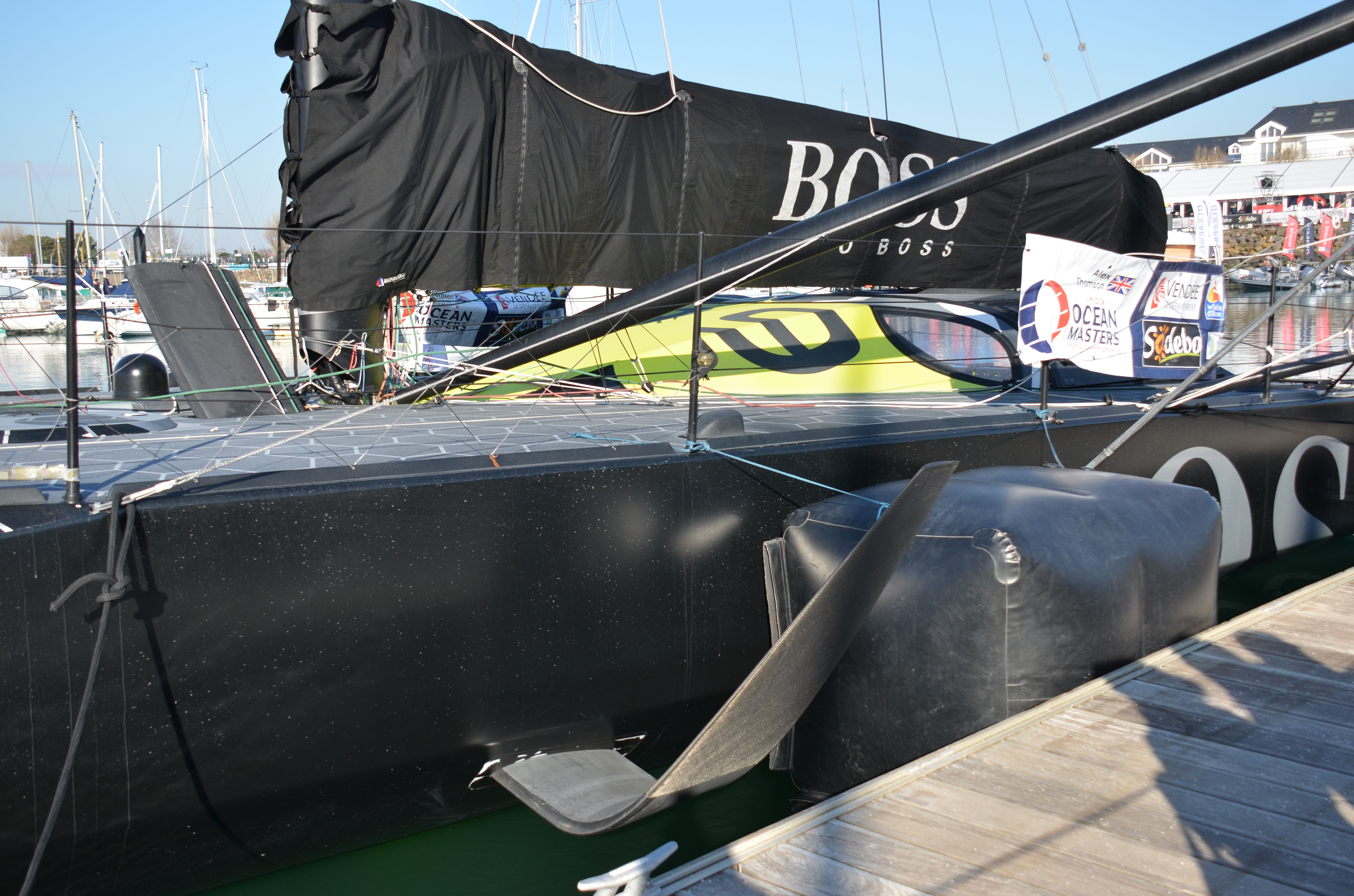 Détail d'un foil sur Hugo boss 2015.